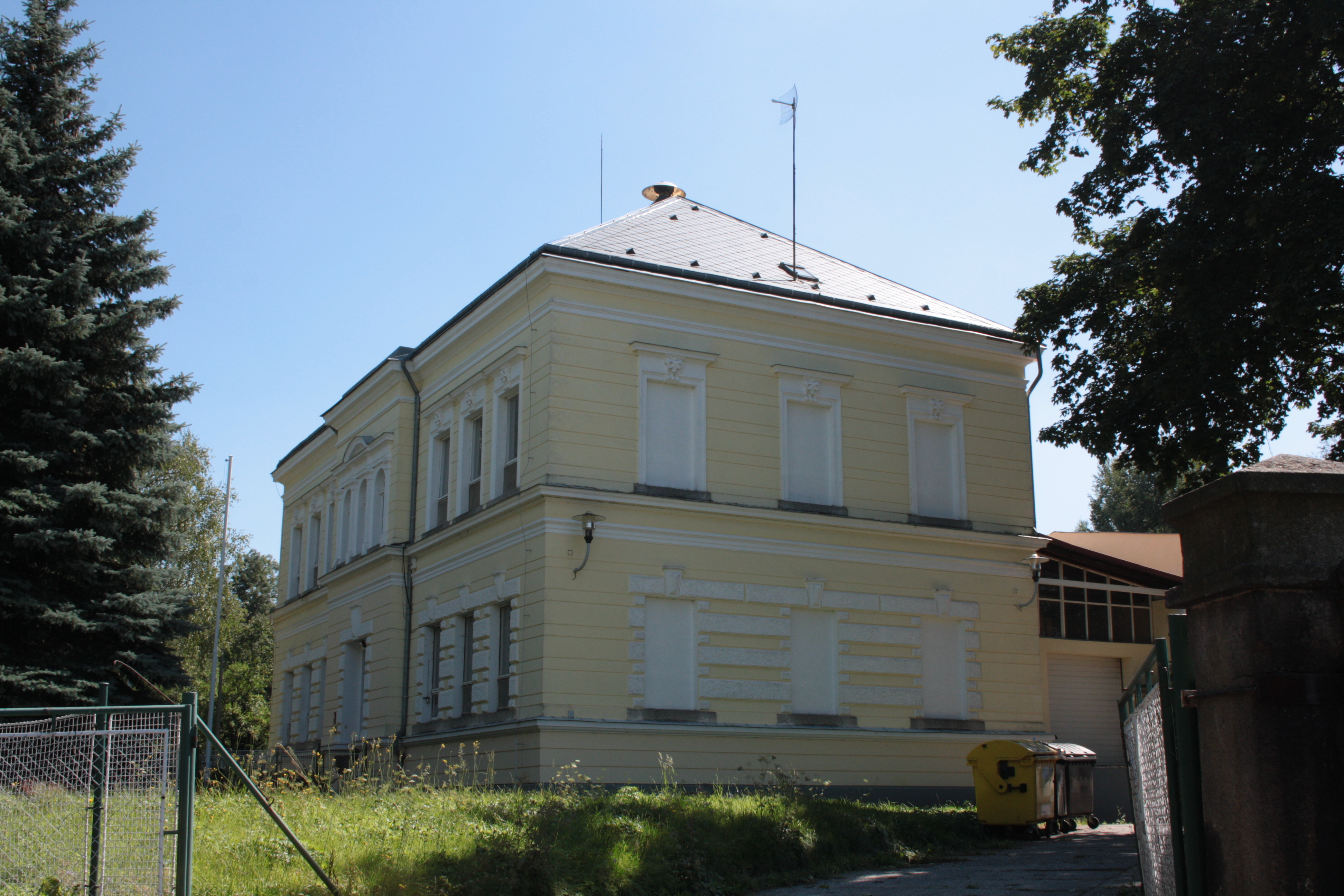 This photograph was taken with a DSLR from WMCZ's Camera grant. Bývalá škola v Ludvíkově pod Smrkem.